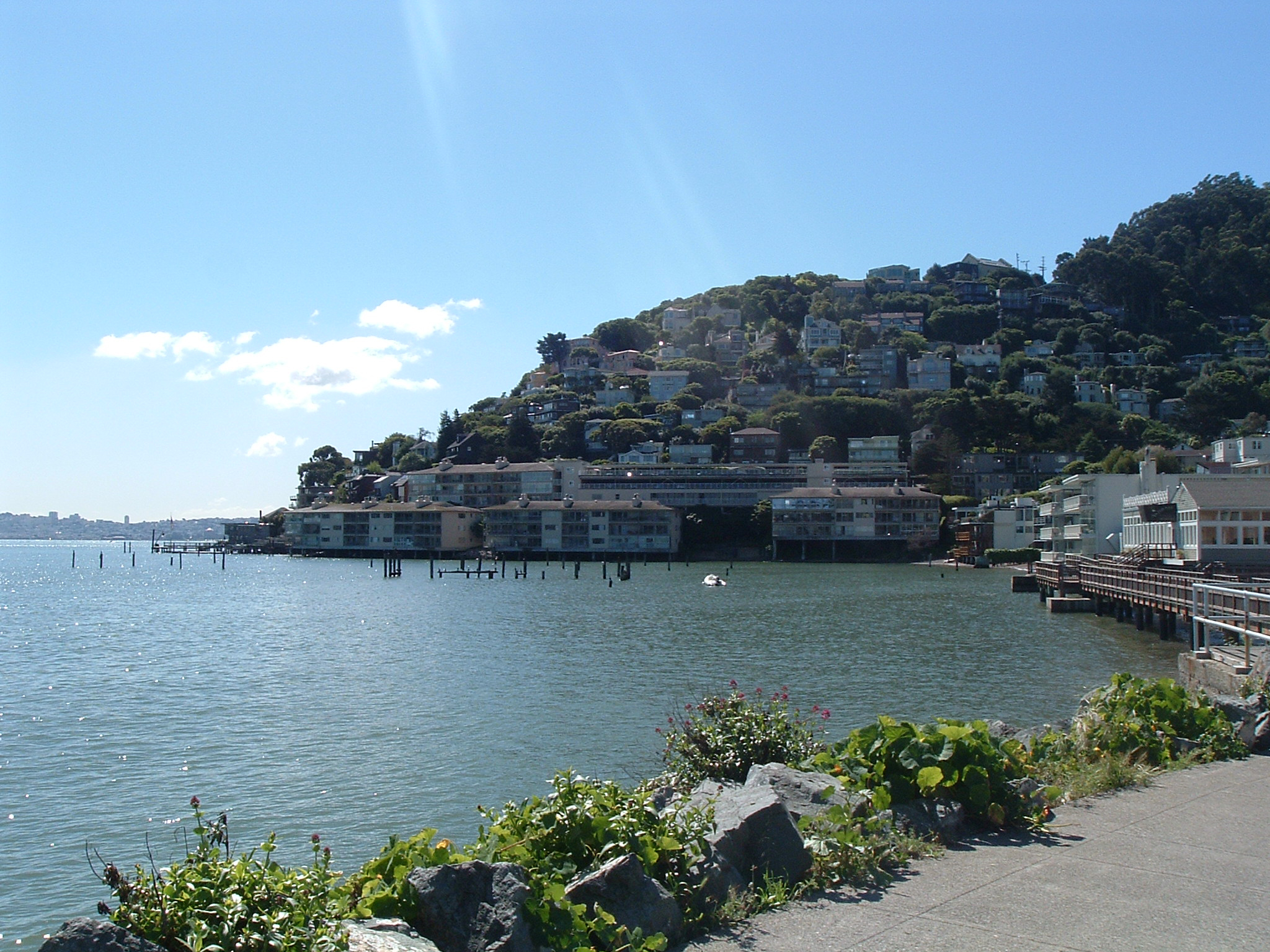 Sausalito, CA (USA)